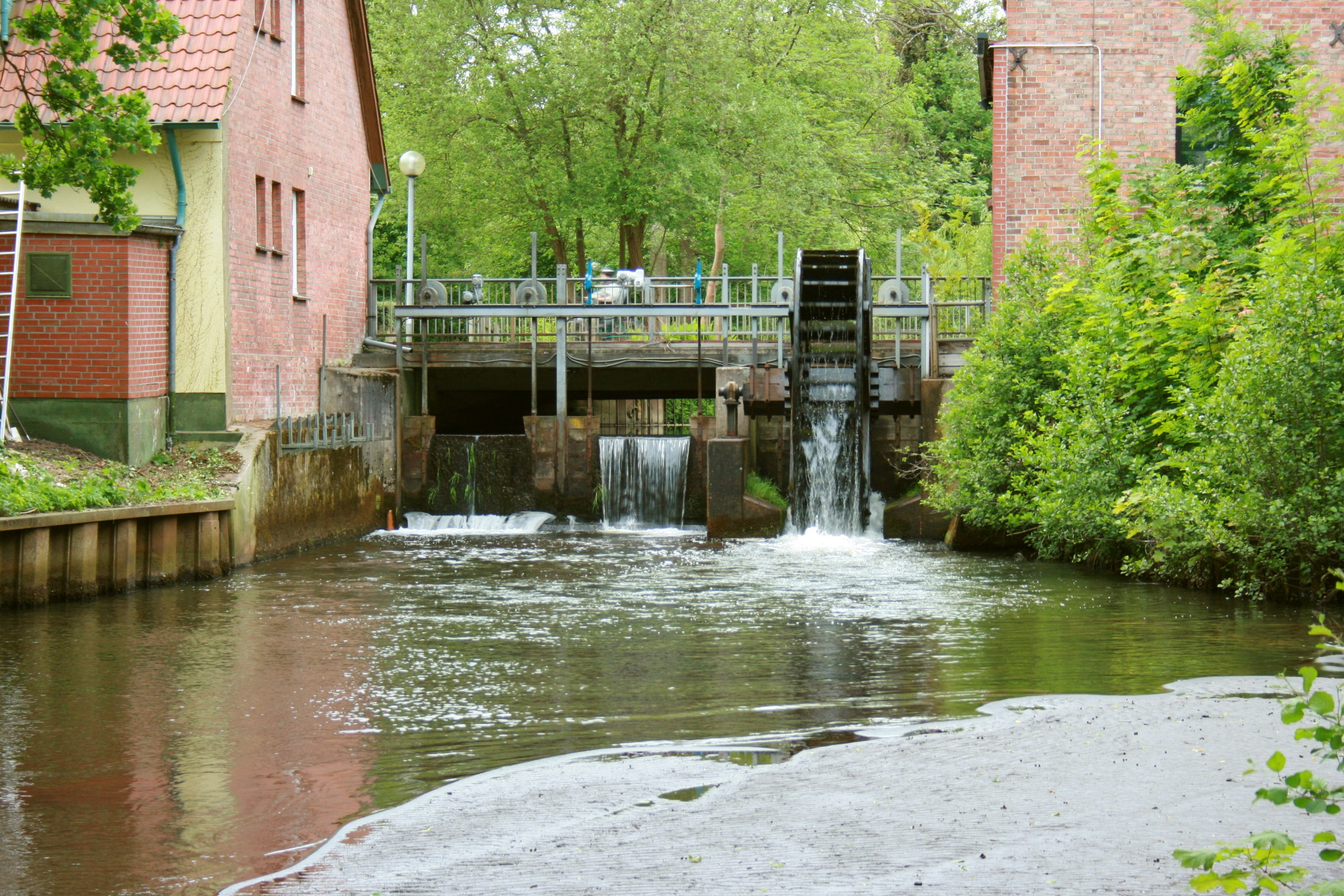 Bibliothek Waldmühle am Böhmepark in Soltau